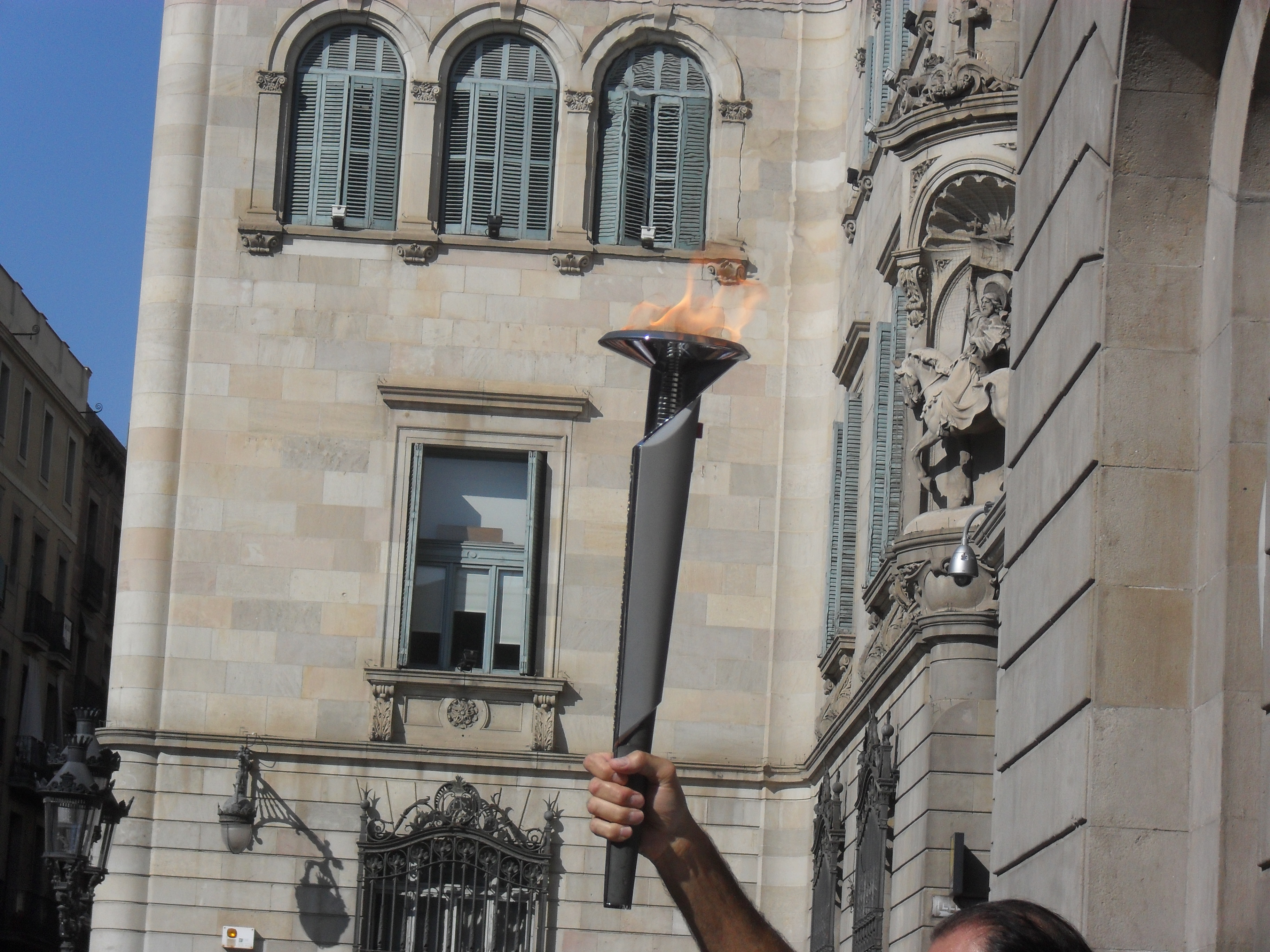 antorcha olimpica-barcelona